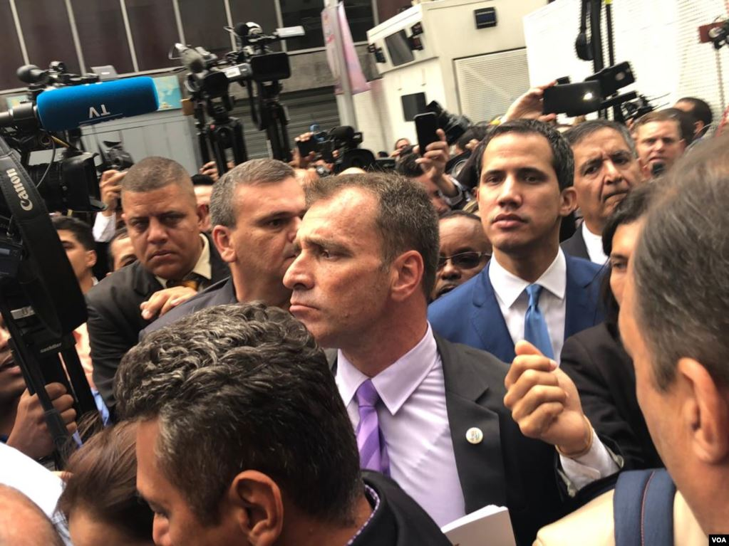 Operación Alacrán